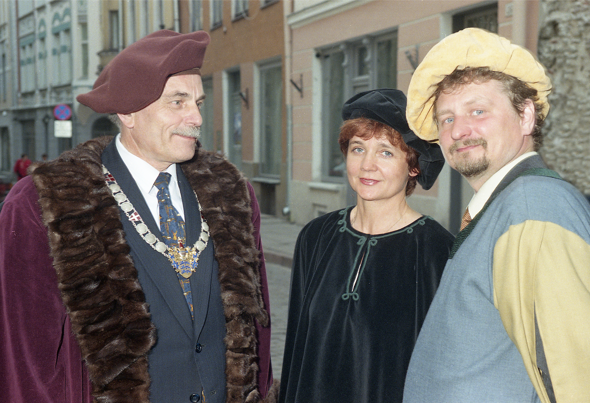 Peeter Lepp, Tallinna eksmeer, Eha Lepp ja Alar Rästa Vanalinna päevadel 99